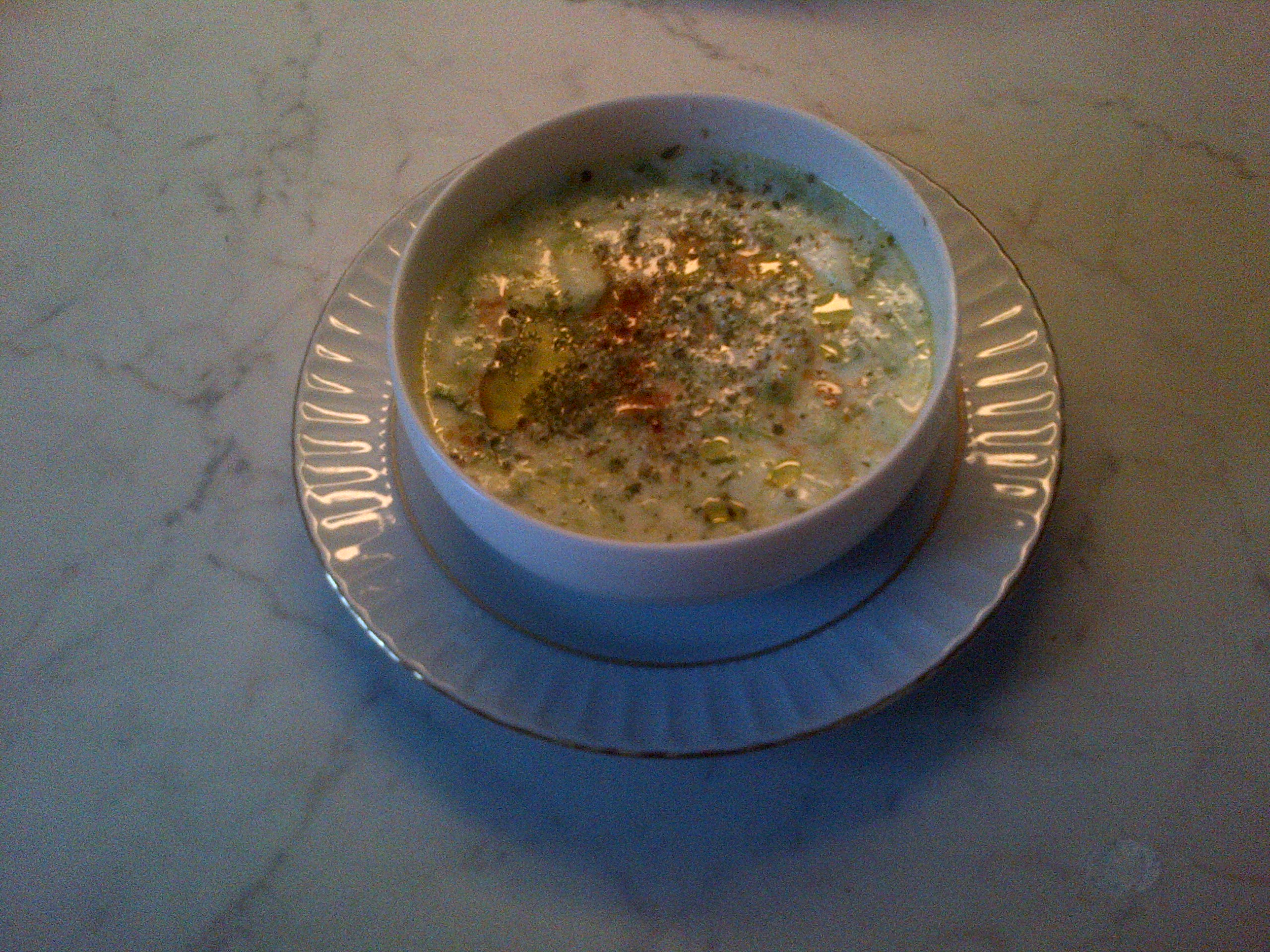 Cacık casero.